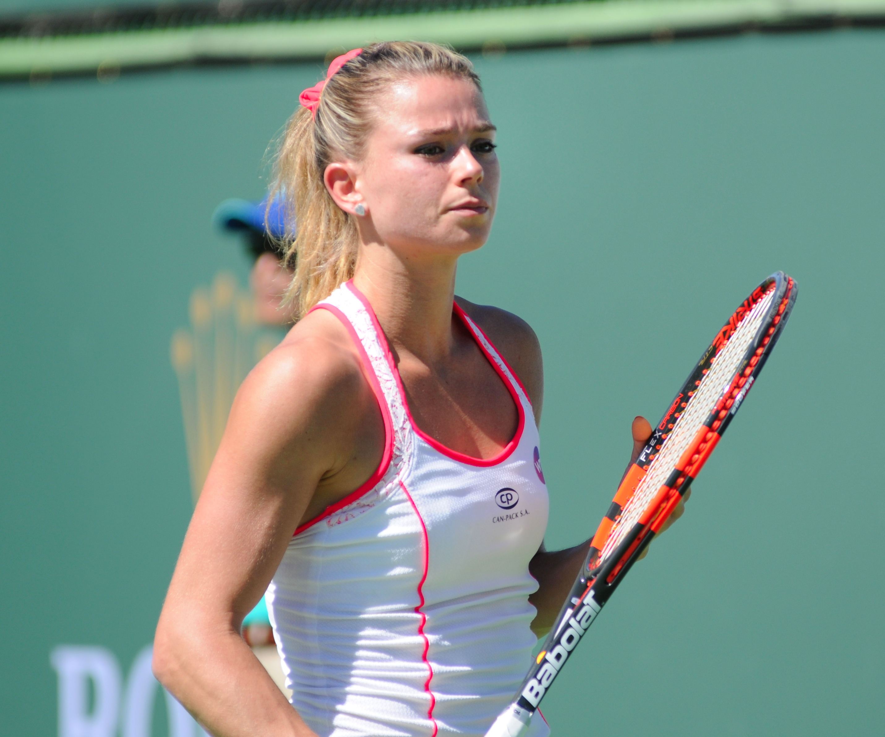 BNP Paribas Open 2016